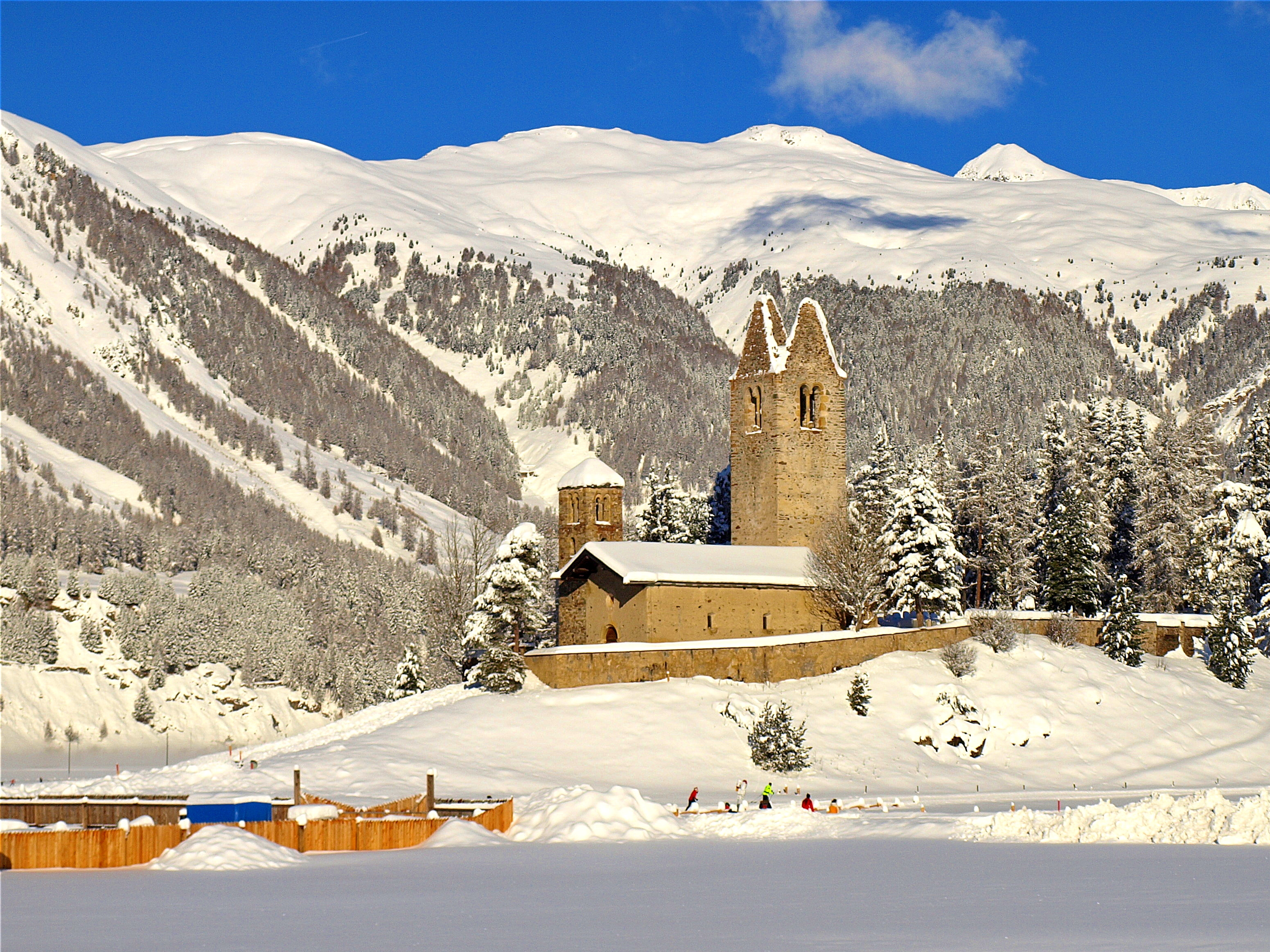 sankt moritz - switzerland